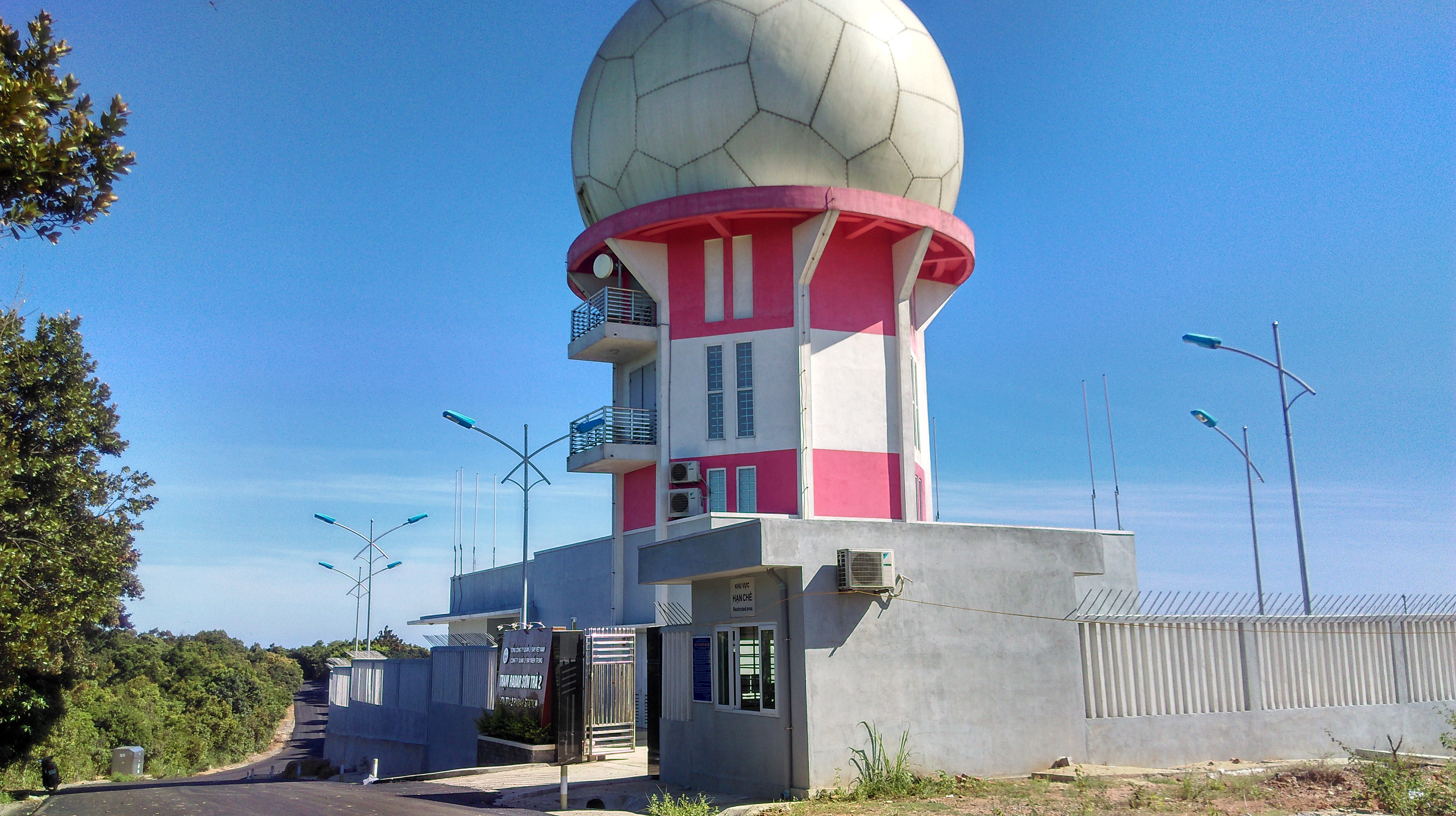 Trạm Radar Sơn Trà 2